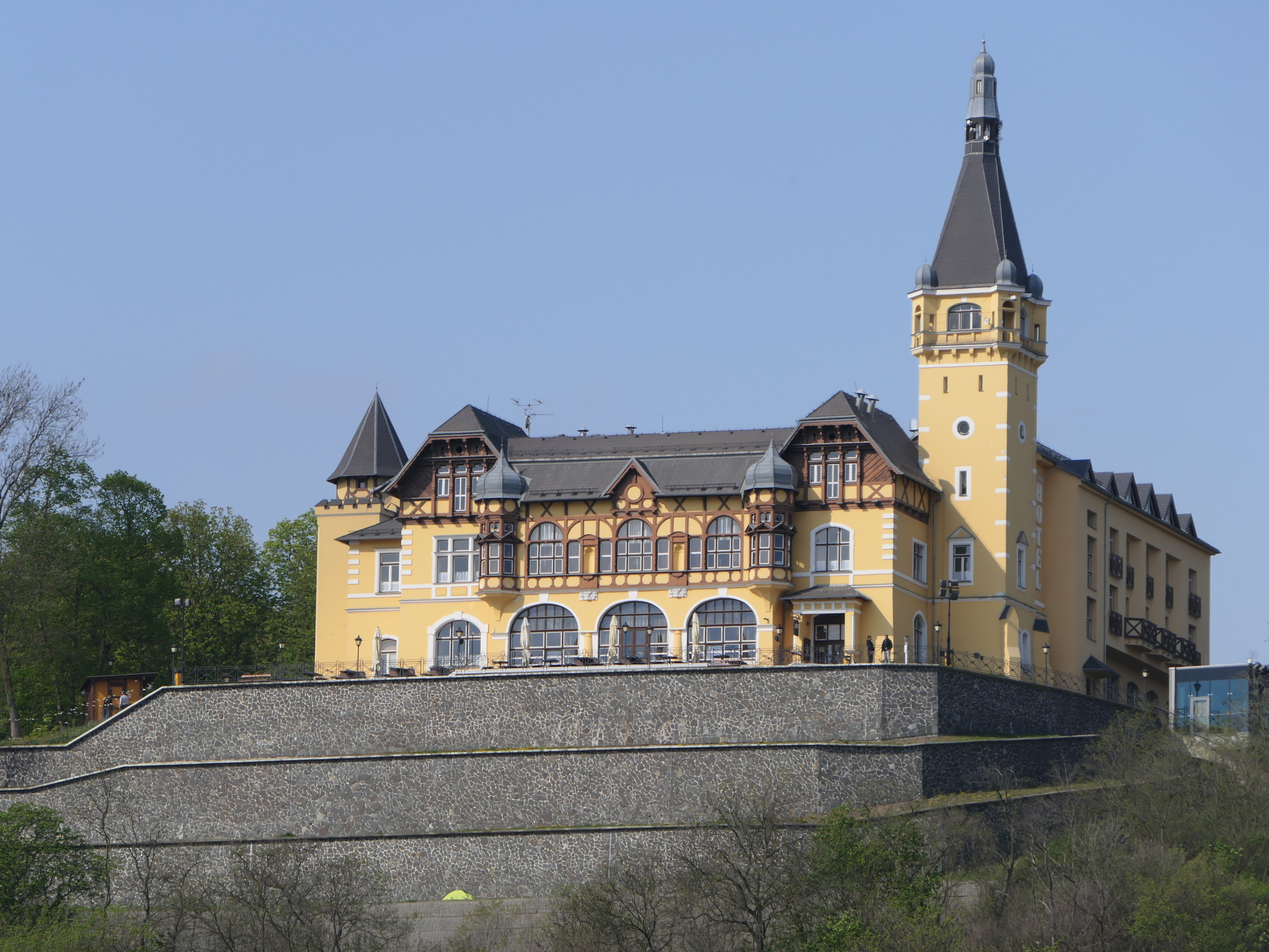 Berghotel Vetruse in Aussig (Větruše, Ústí nad Labem)